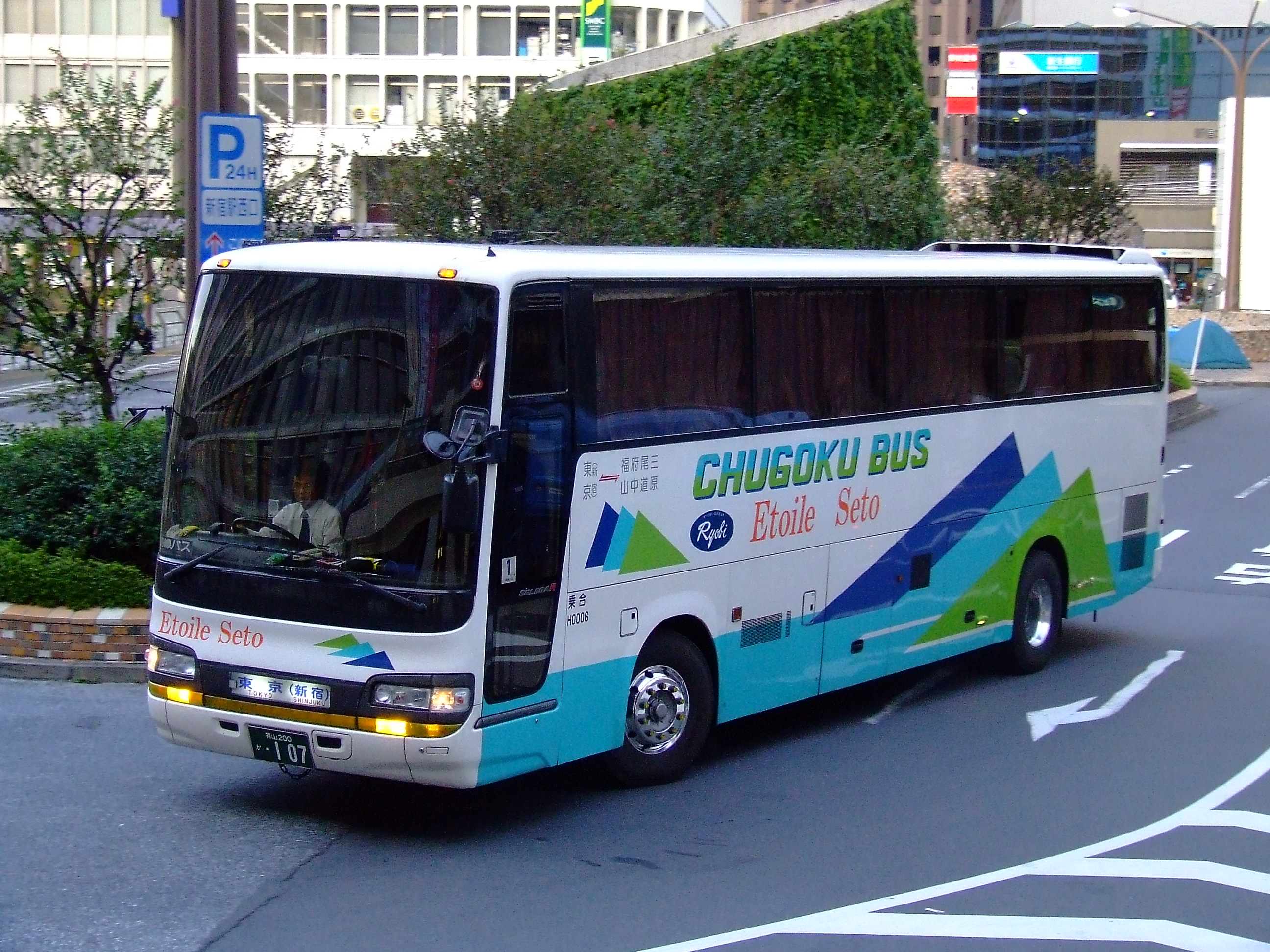 中国バスの夜行高速バス「エトワールセト号」 新宿駅西口にて